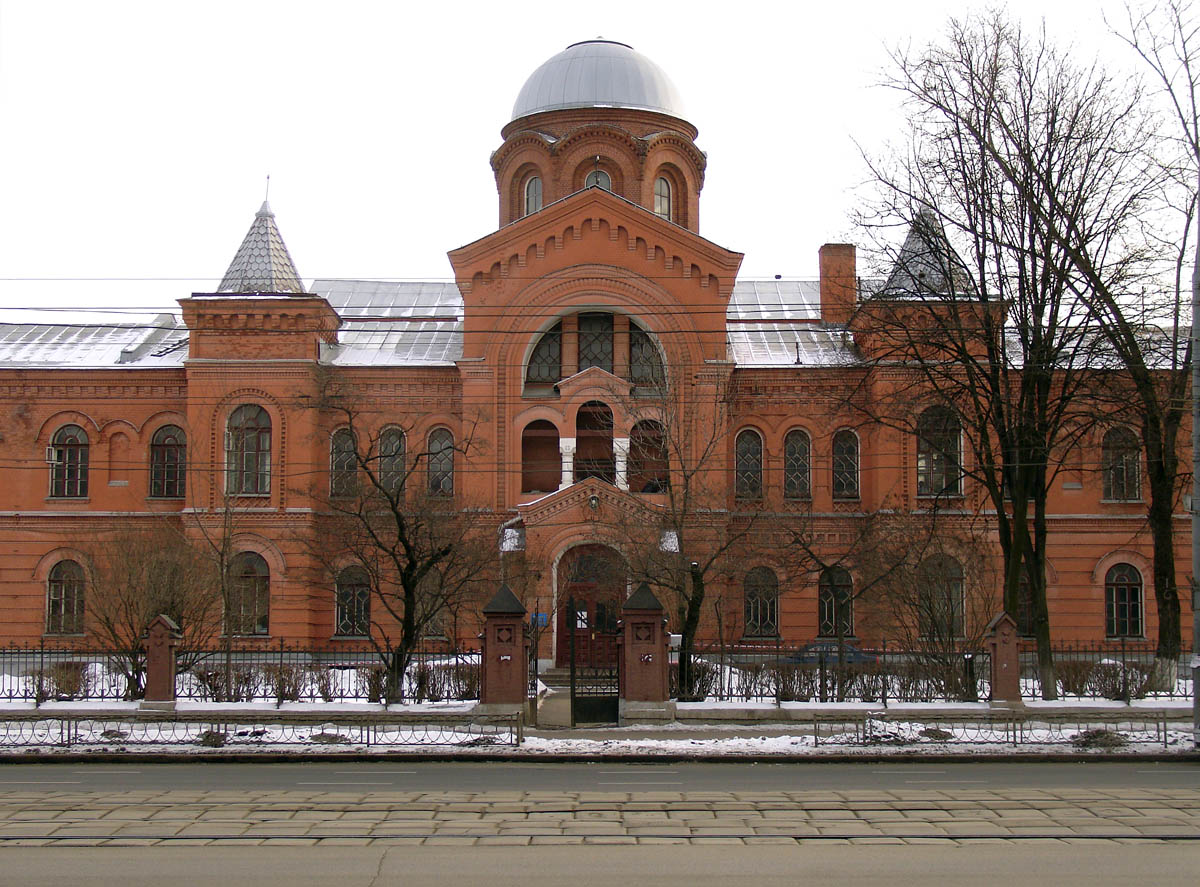 Stromynka, 10 - Sokolniki Hospital, Moscow